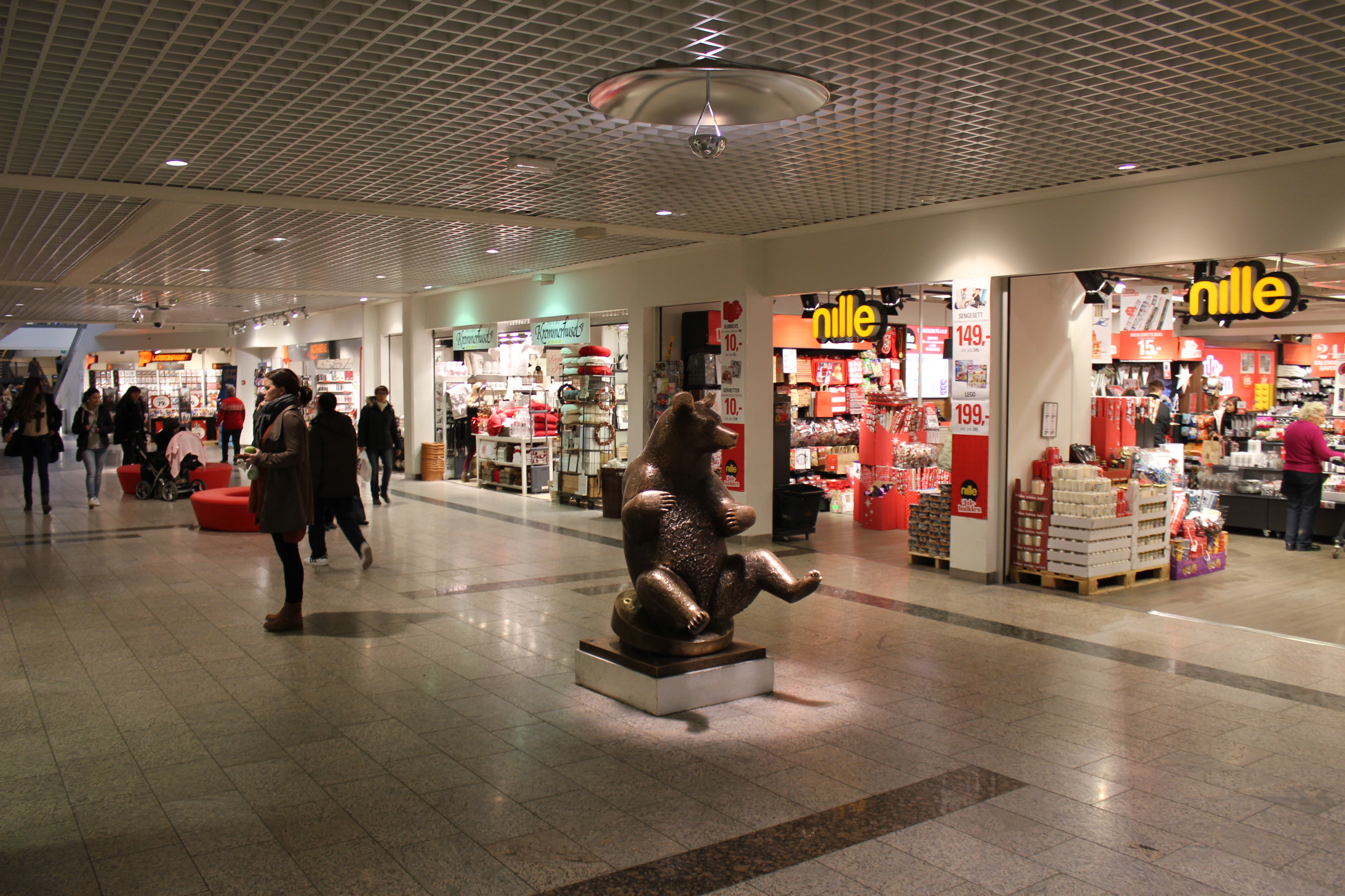 CC på Gjøvik.